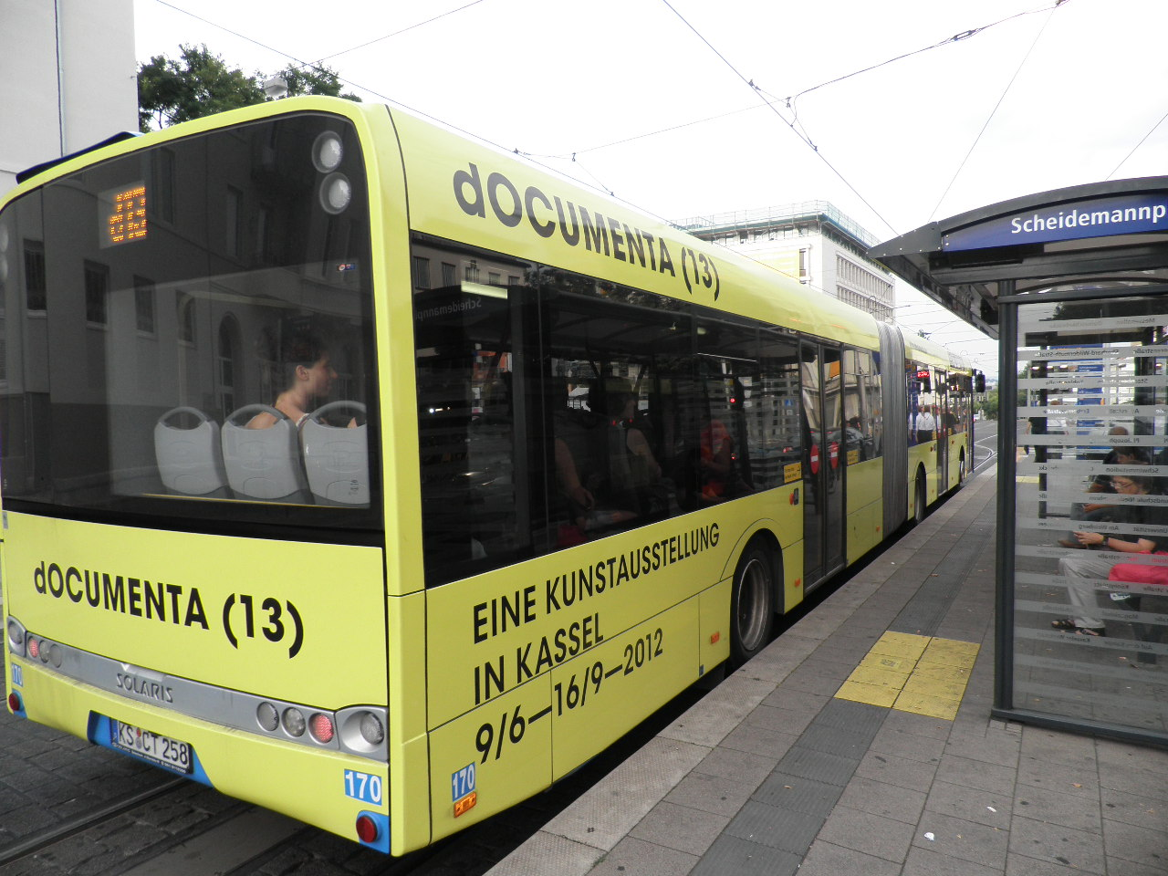 Documenta 13 Kassel 2012. OLYMPUS DIGITAL CAMERA